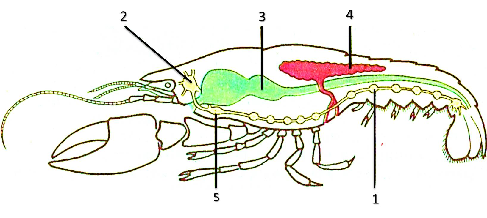 Нервова травна і статева системи у річкового рака